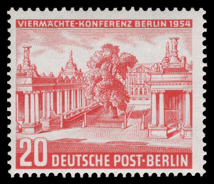 Stamp description / Briefmarkenbeschreibung